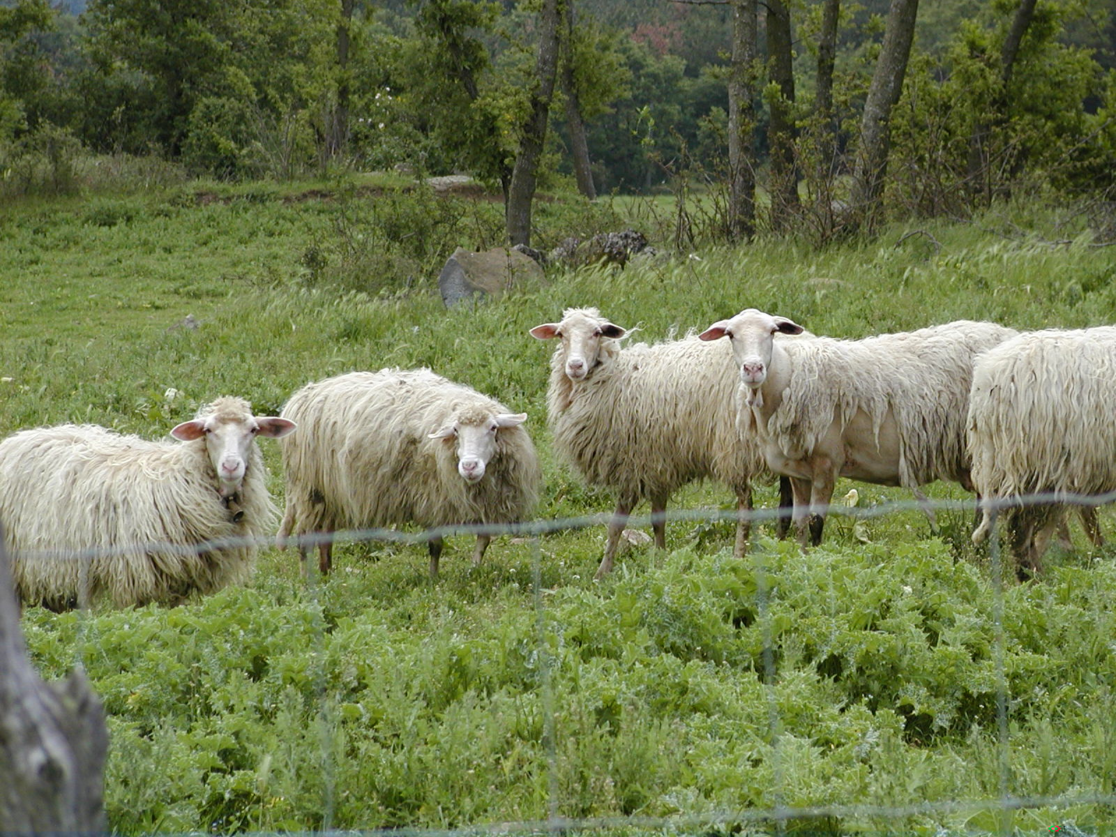 Schafe in der Toskana, Italien